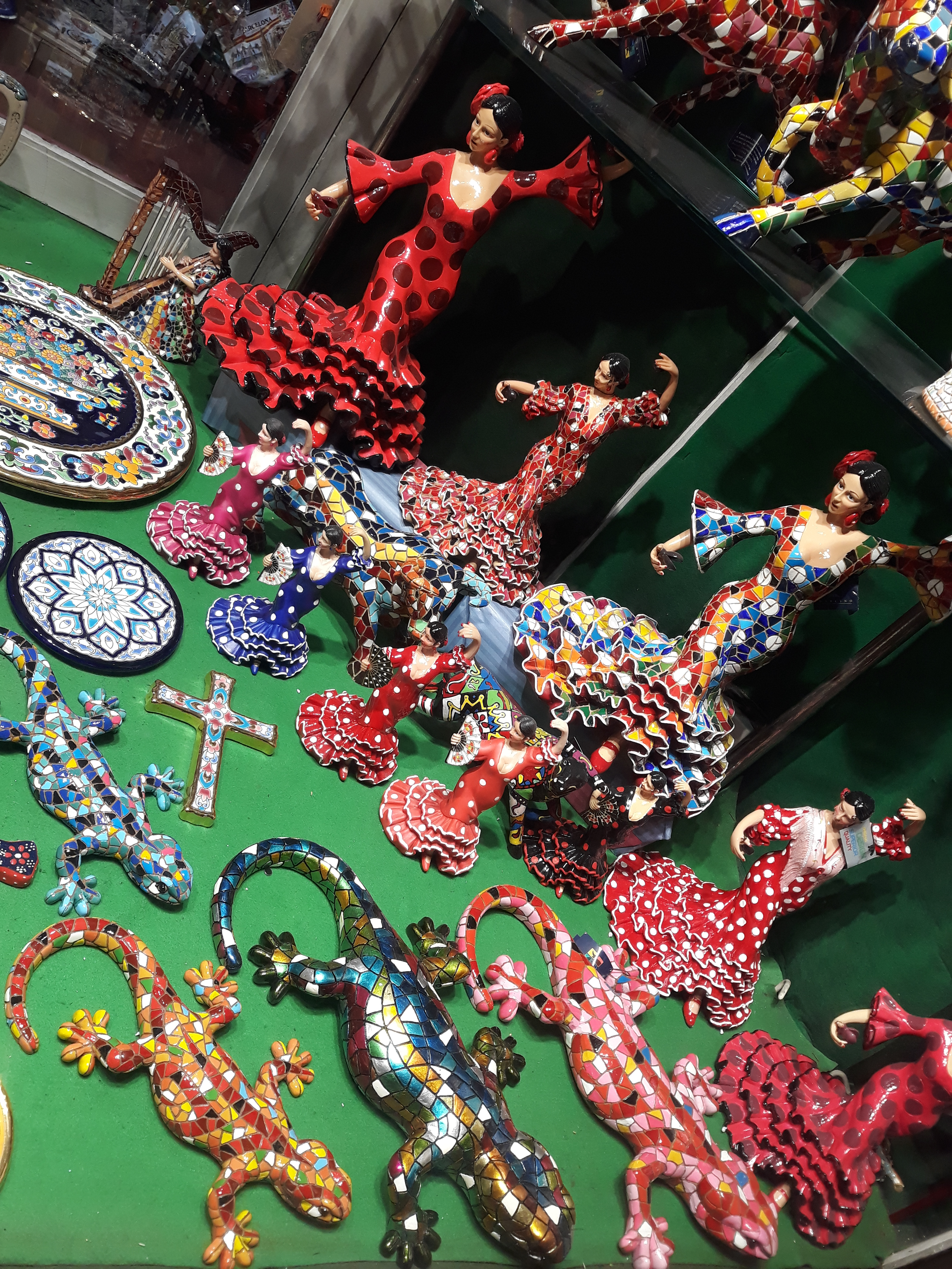 Botiga de souvenirs per turistes, Jaume 1r 17